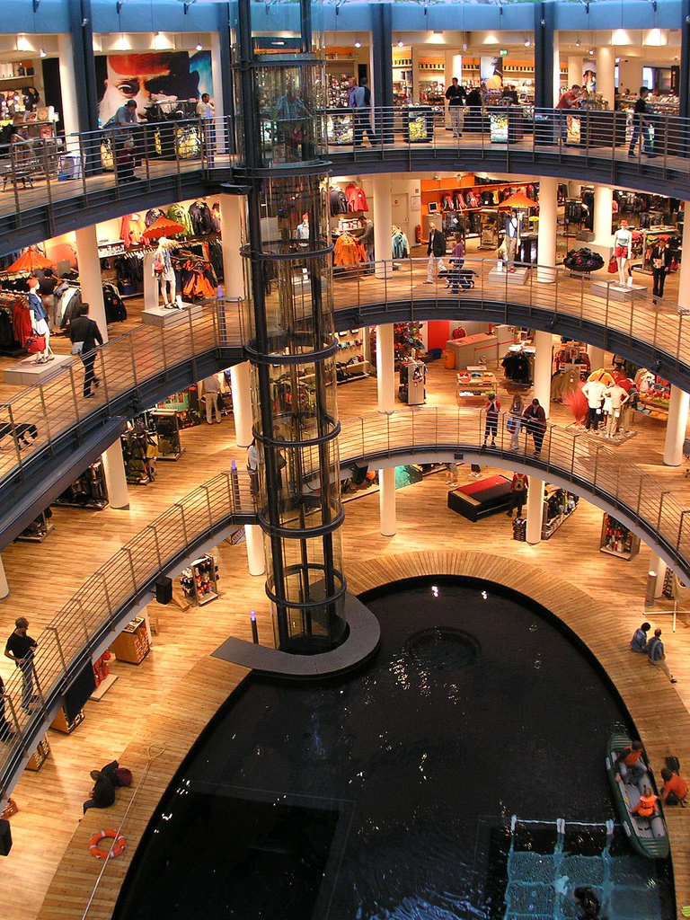 Filiale des Outdoor-Ausrüsters Globetrotter in Köln